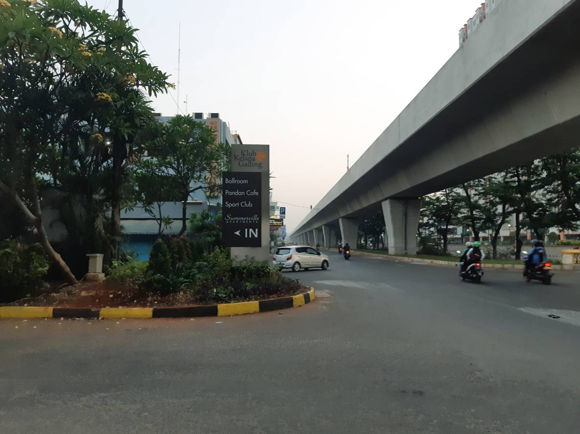 Klub Kelapa Gading